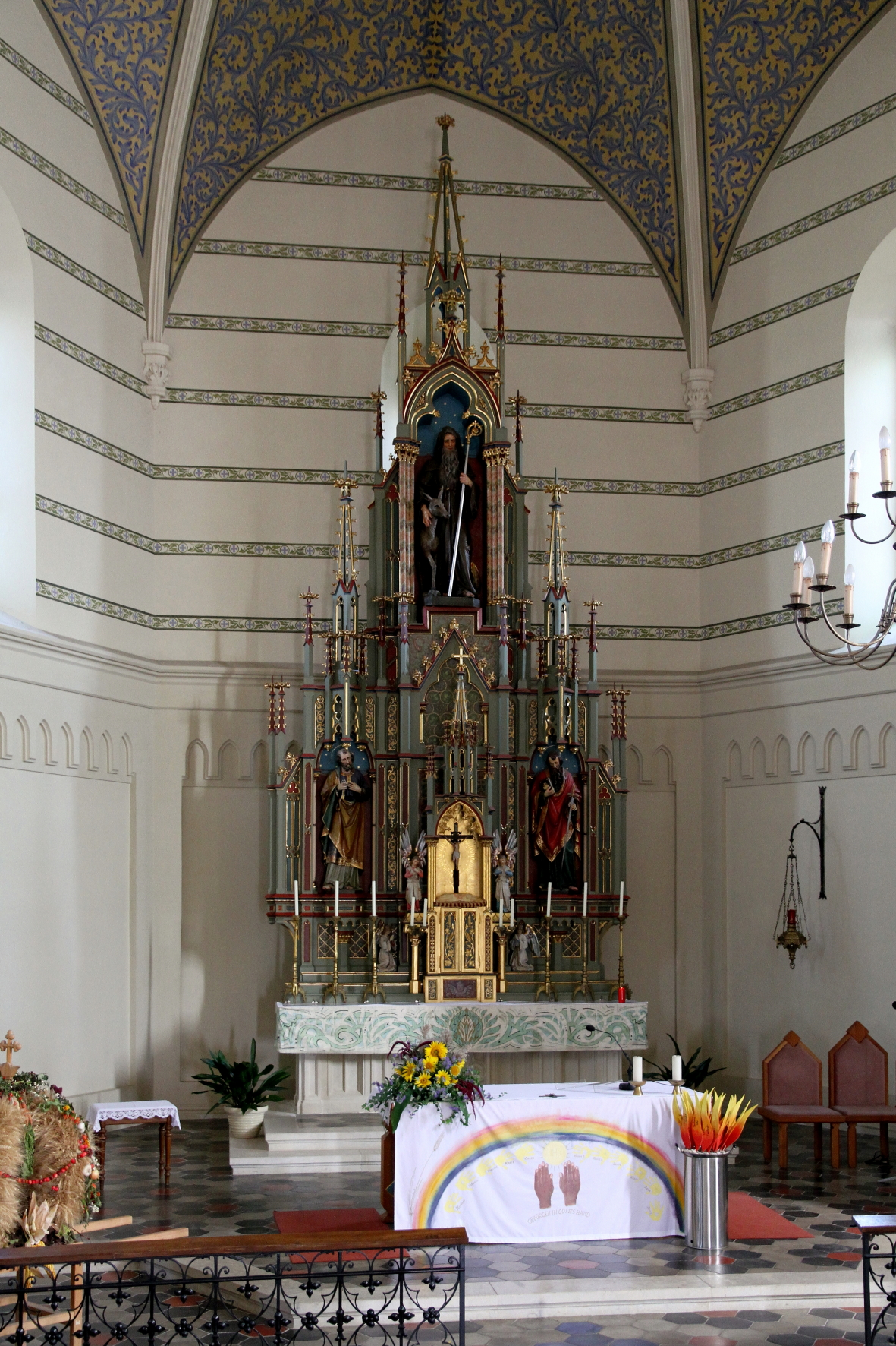 Hochaltar der kath. Pfarrkirche hl. Ägidius in der burgenländischen Gemeinde Müllendorf.